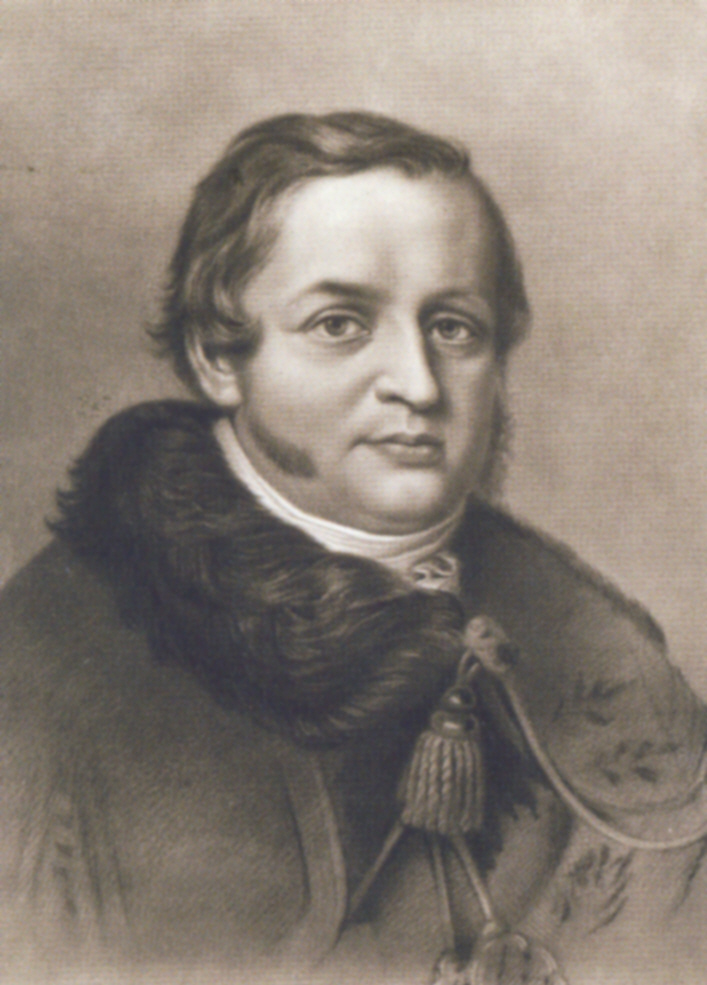 Porträt Carl Christian Deffner (1789–1846)